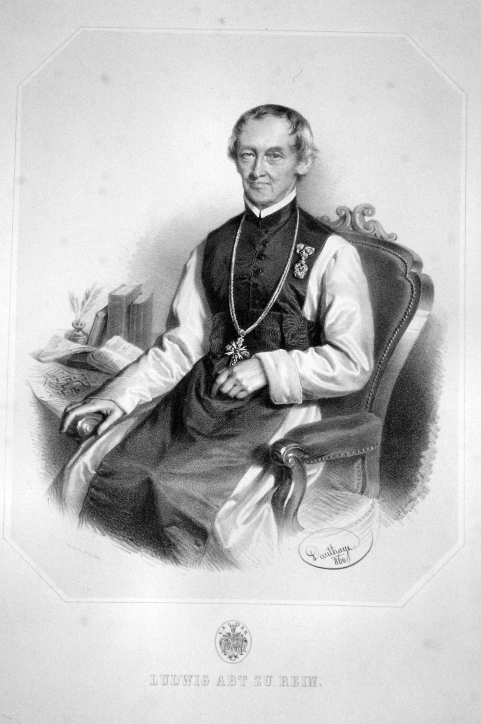 Ludwig Crophius (1772-1861), Edler von Kaisersieg, ab 1823 Abt des Zisterzensier Stiftes Rein bei Graz. Lithographie von Adolf Dauthage, 1860